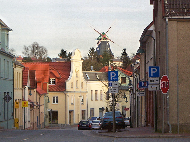 die Mühle in Kröpelin "ganz oben"